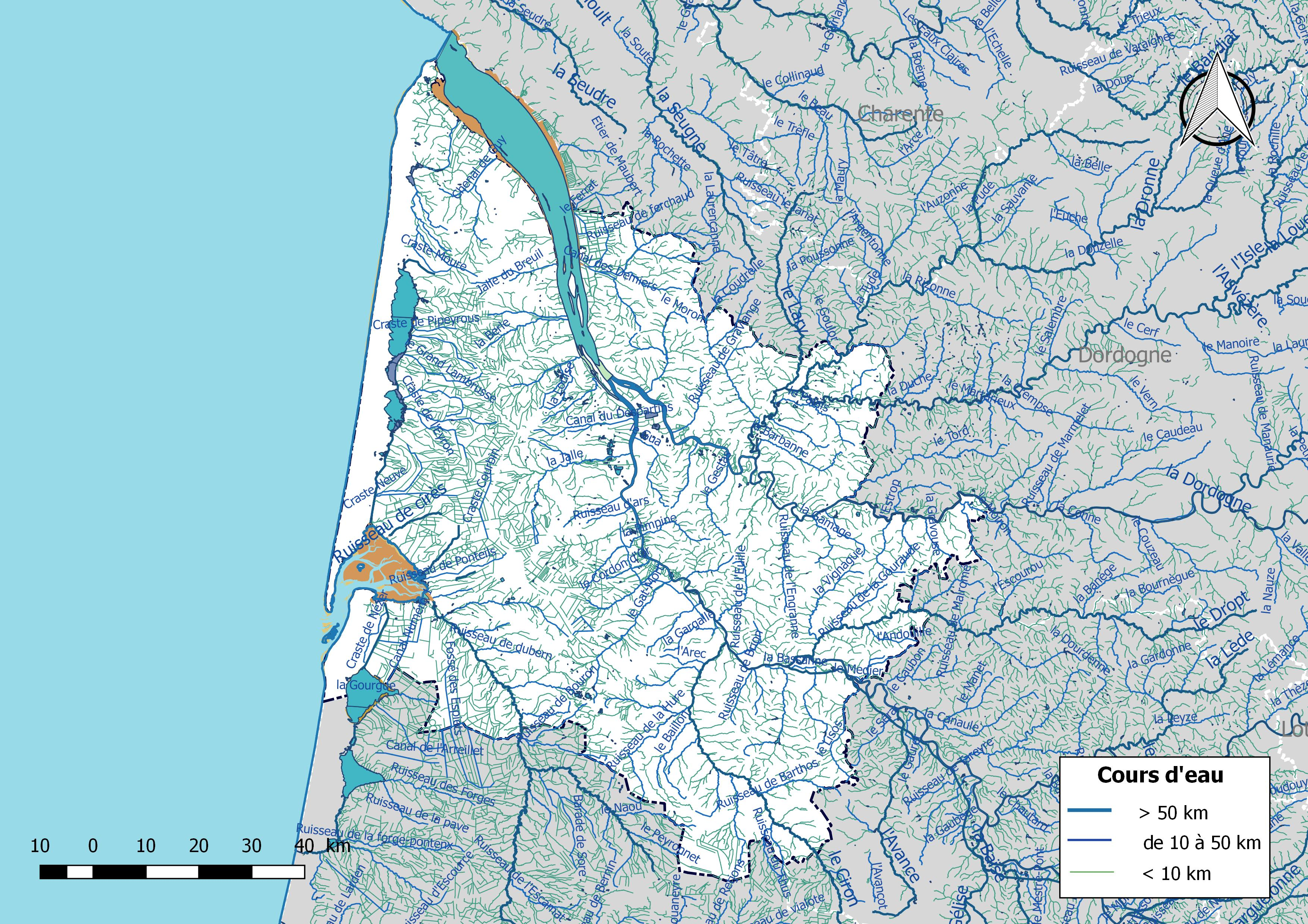 Réseau hydrographique du département de la Gironde (France).